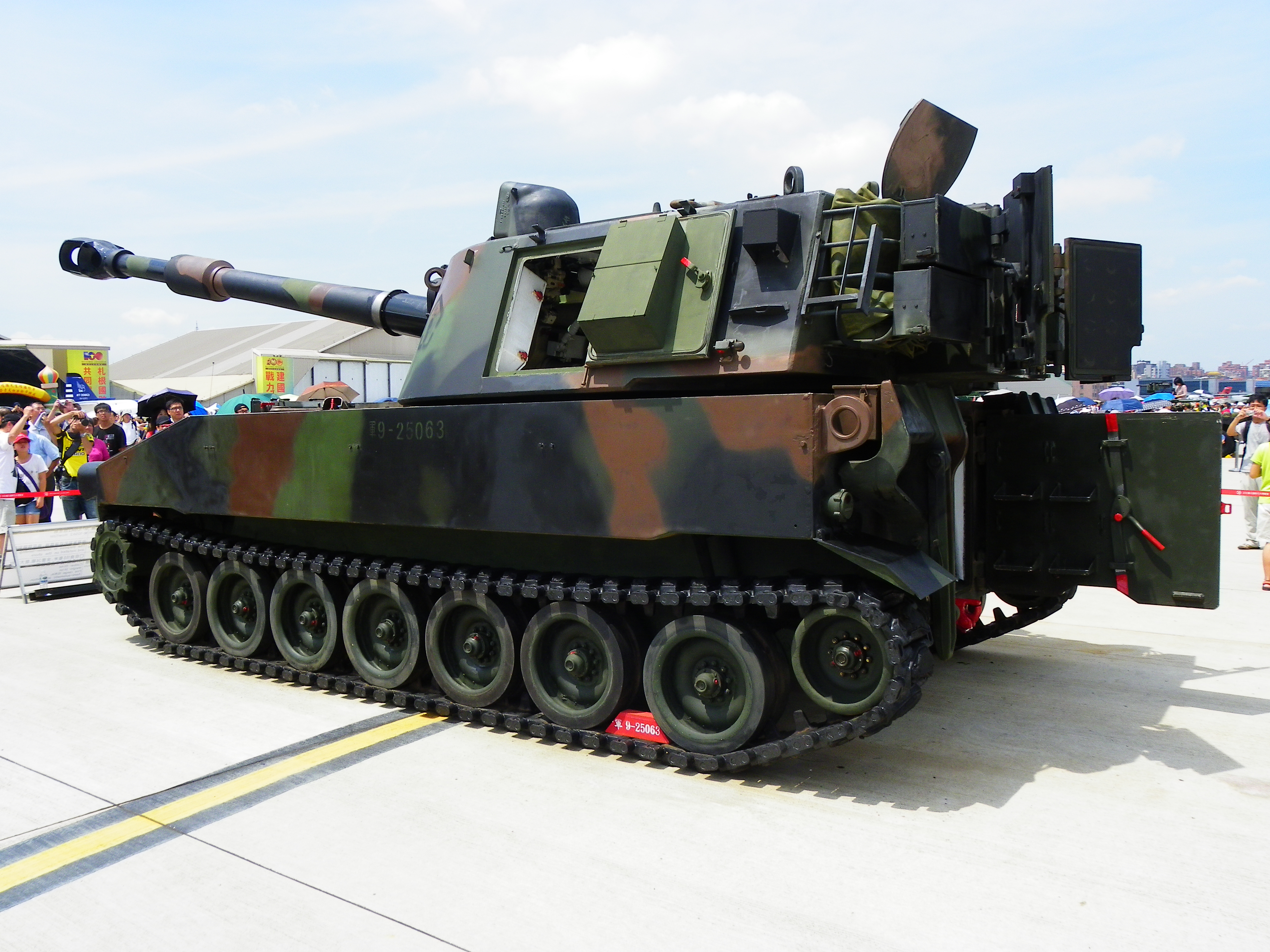 左斜後方所見M109A2自走榴彈砲，攝於2011年空軍松山基地營區開放活動。